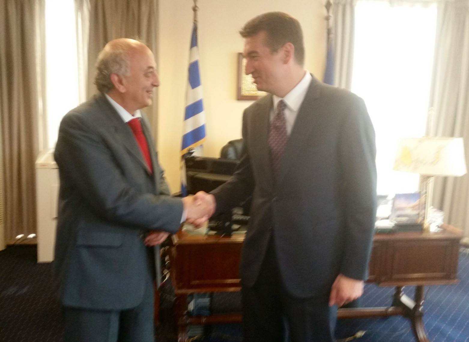 Συνάντηση Υφυπουργού Εξωτερικών, Γιάννη Αμανατίδη με τον νέο Πρέσβη της Σερβίας στην Ελλάδα, κ. Dušan Spasojević, ΥΠΕΞ, 07.06.2016